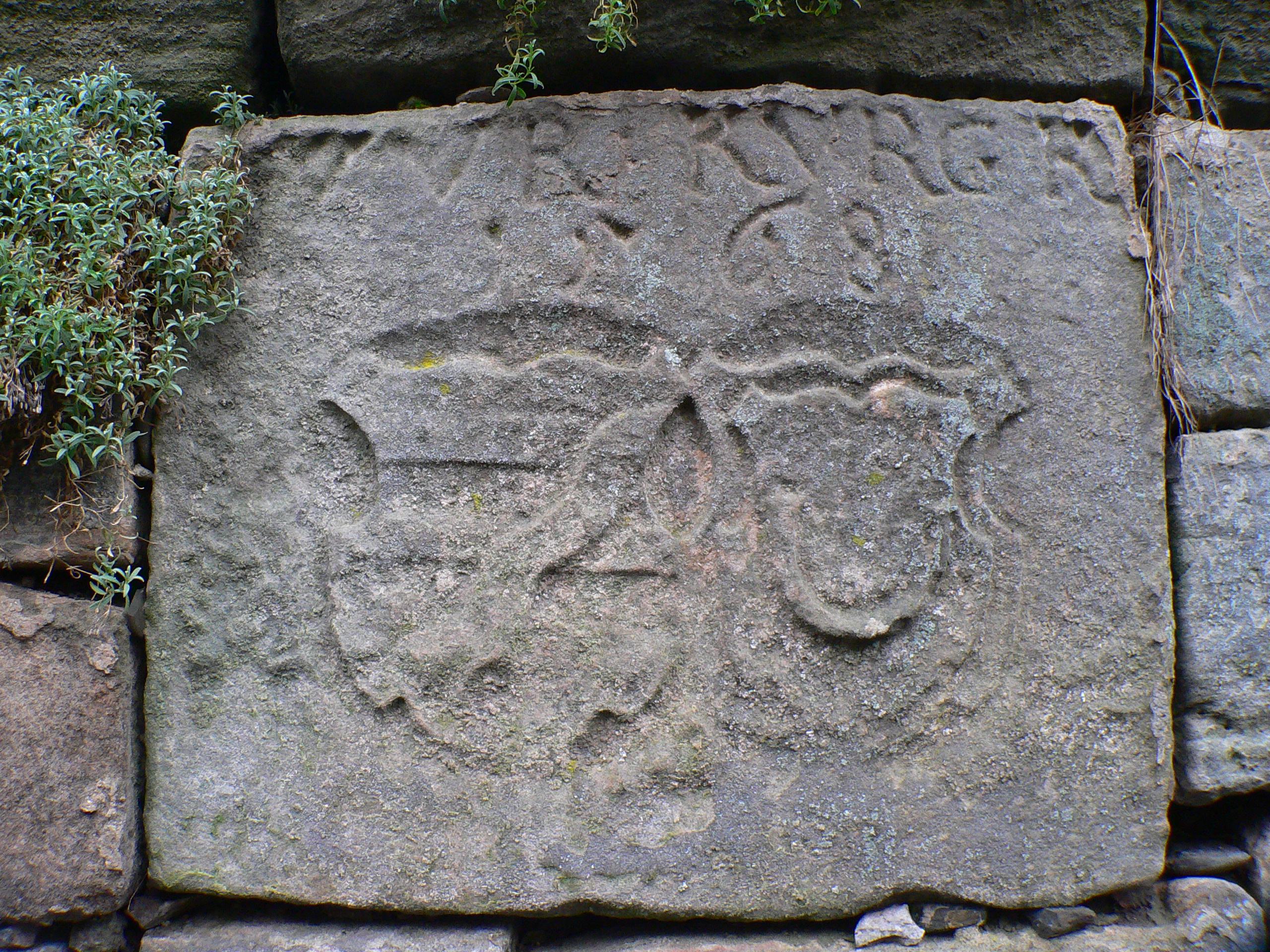 Schloss Theisenort in Küps, Bayern, Regierungsbezirk Oberfranken, Landkreis Kronach – Allianzstein aus 1568